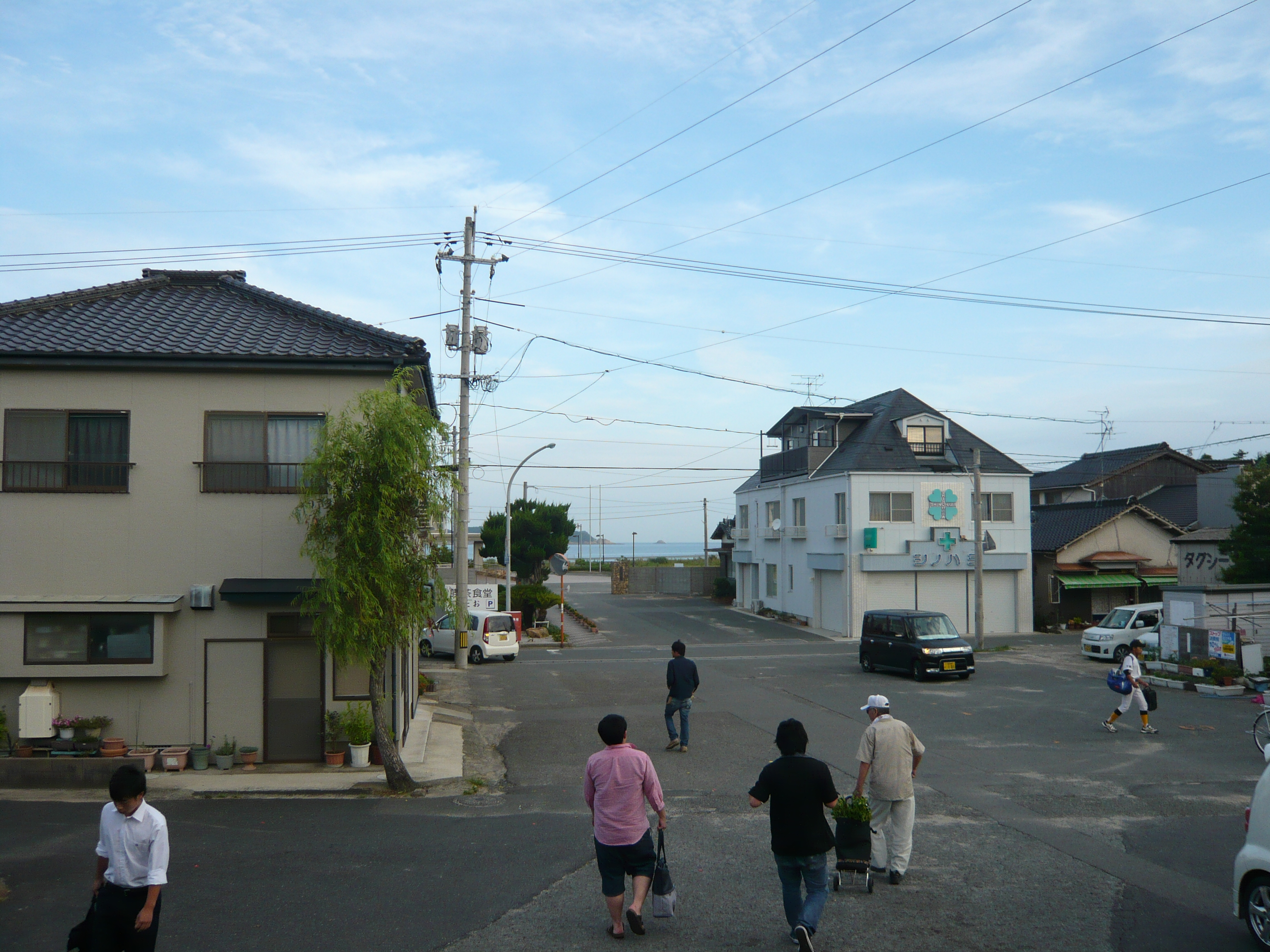 山陰線小串駅前